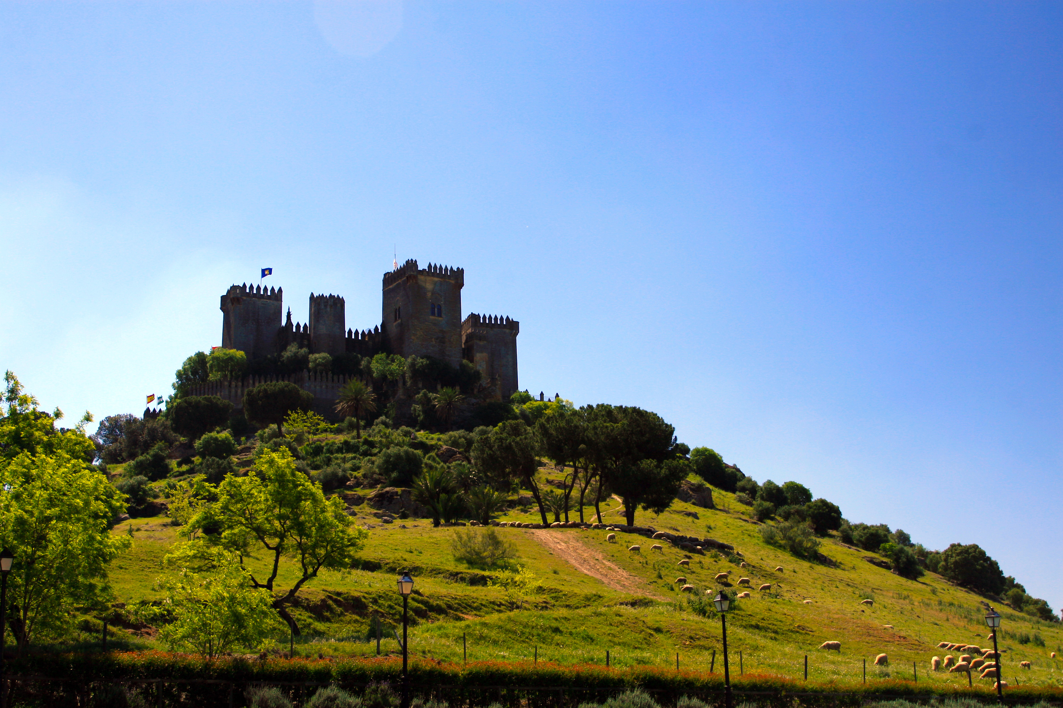 Castillo de Almodóvar del Río (España).